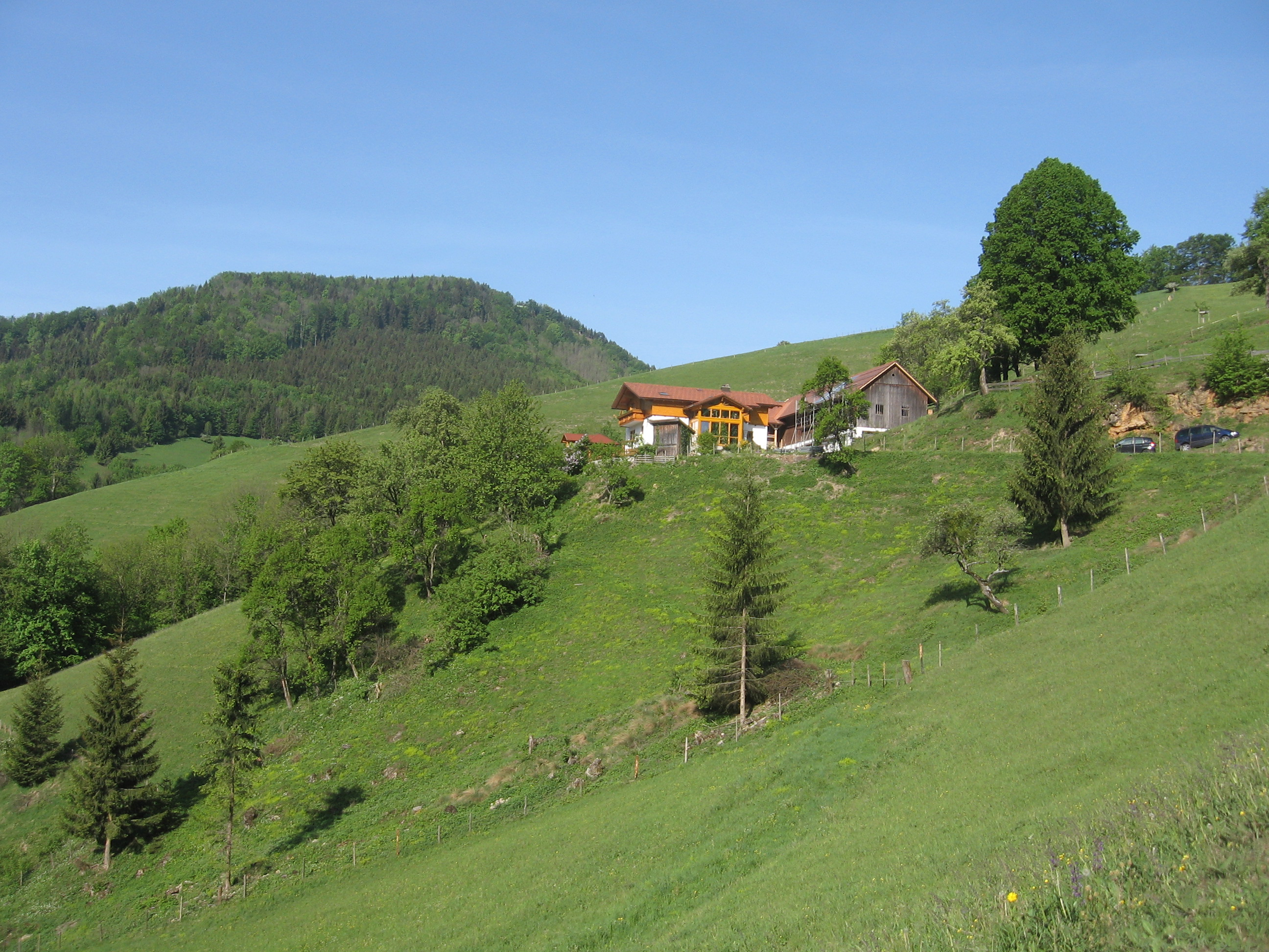 2009-05-10 Haltgraben in Frankenfels Richtung Schwabeck